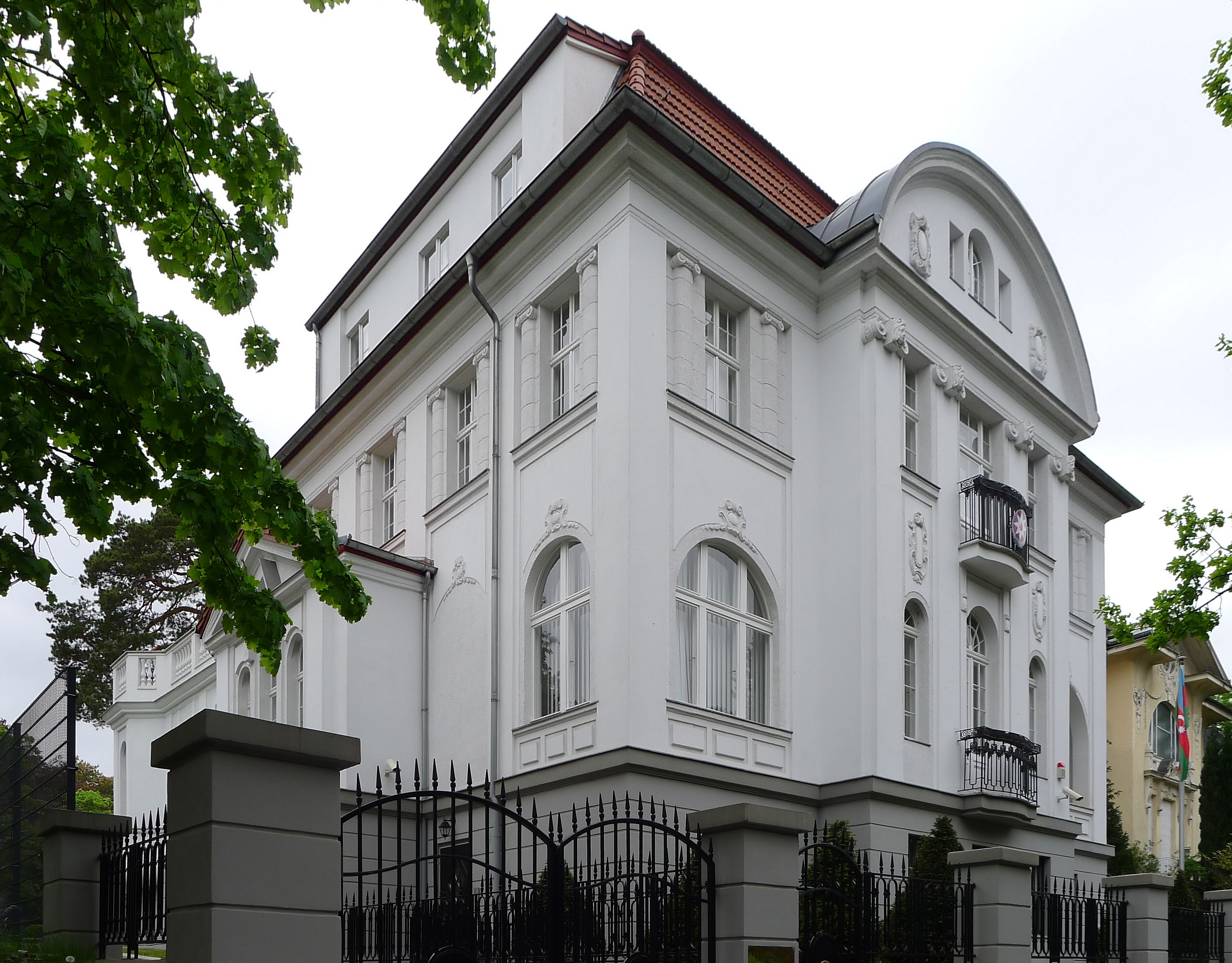 Wohnhaus